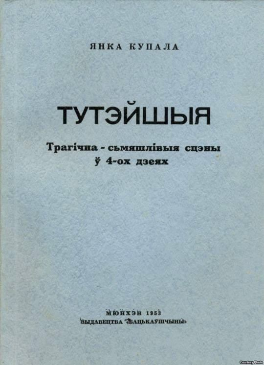 вокладка мюнхенскага выдання п'есы Янкі Купалы «Тутэйшыя»